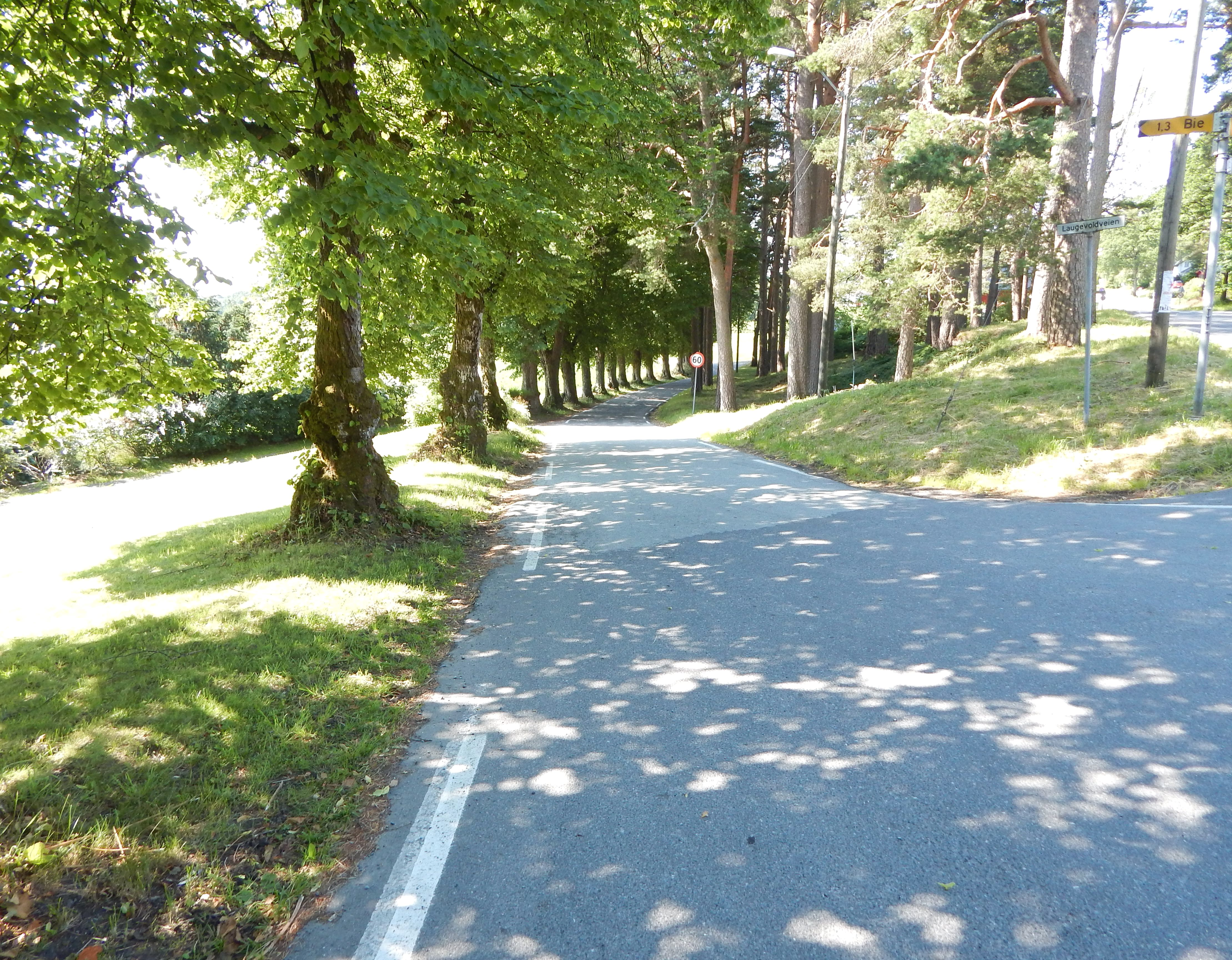 Fylkesvei 34 sør for Fjære kirke